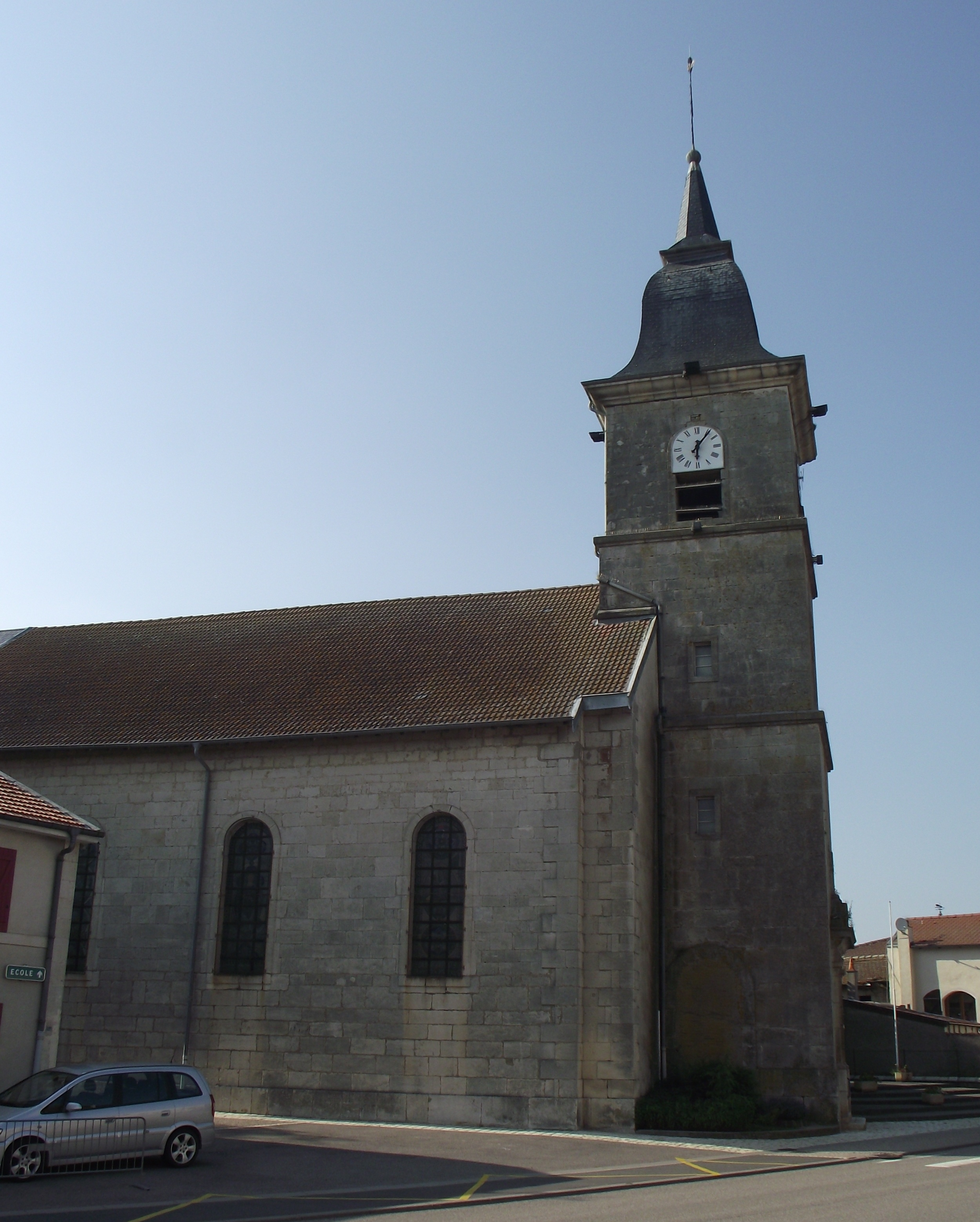 Église Saint-Maurice de Allain (54)